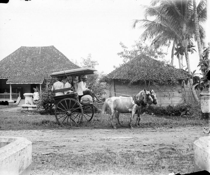 Negatief. Transport vereiste voor de komst van de auto vaak het inschakelen van paarden. In de steden waren rijtuigverhuurderijen een normaal verschijnsel, wat ze overigens ook na de komst van de auto nog decennia lang zouden blijven. De foto laat een bendie zien. Sumatra kende twee inheemse paardenrassen, namelijk het Batakpaard uit Noord-Sumatra en het paard van de Padangse Bovenlanden dat men doorgaans aanduidde als het Sumatraanse paard. Rond 1900 begon het gouvernement met pogingen om dat laatste ras te verbeteren, waartoe Sandelhoutpaarden (van Soemba) werden geïmporteerd. (P. Boomgaard, 2001). Klein rjituig te Solok